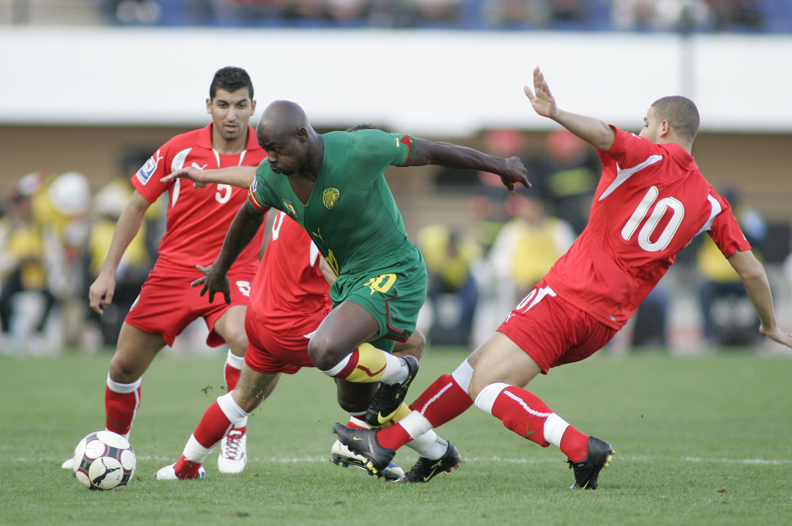 Match Maroc - Cameroun